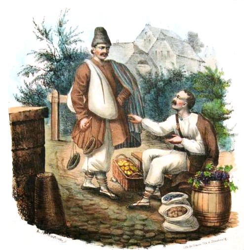 Bojki - litografia ręcznie kolorowana sygnowana na kamieniu: J.Lewicki i lith. de Simon fils a Strasbourg - pochodzi z: Zienkowicz Leon - ""Les Costumes du Peuple Polonaise" - Paryż 1838 -1841